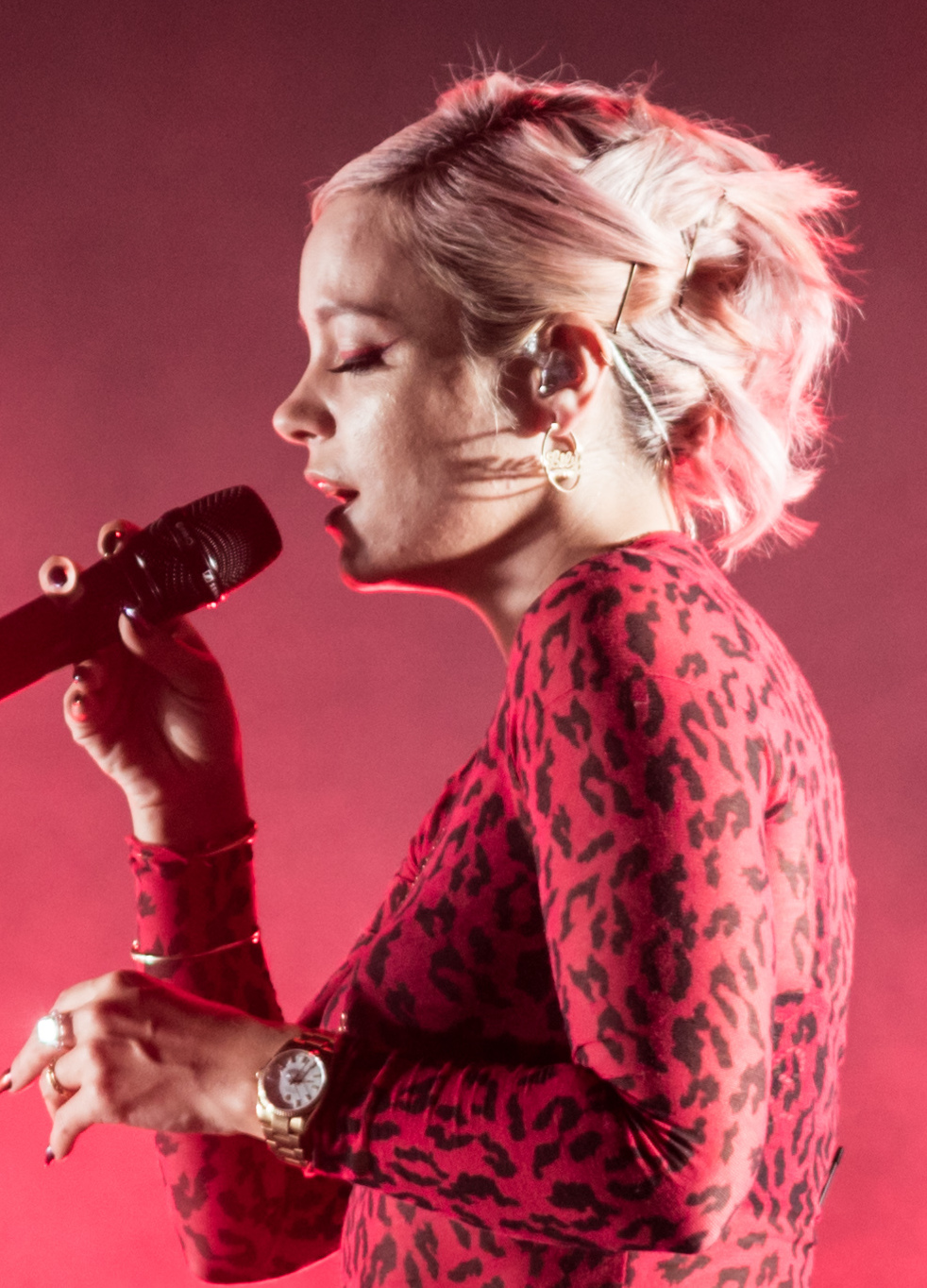 LilyTufnell210318-11